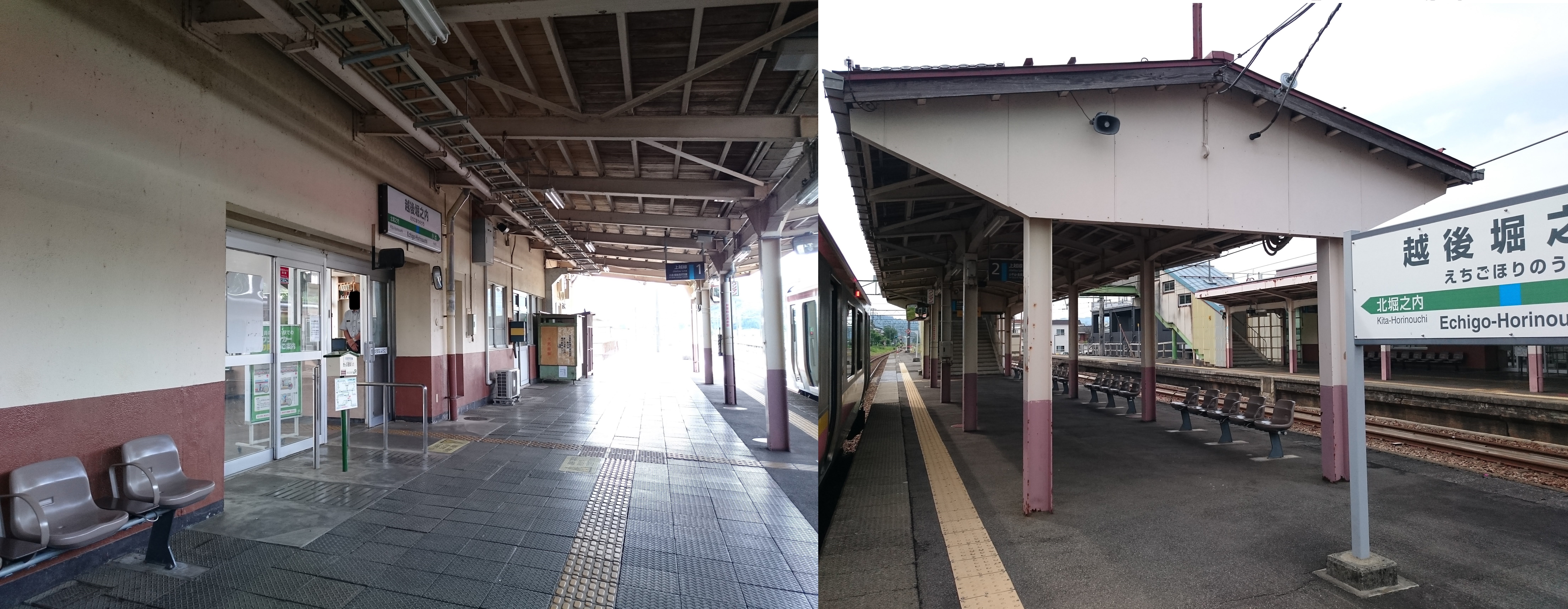 越後堀之内駅のホーム